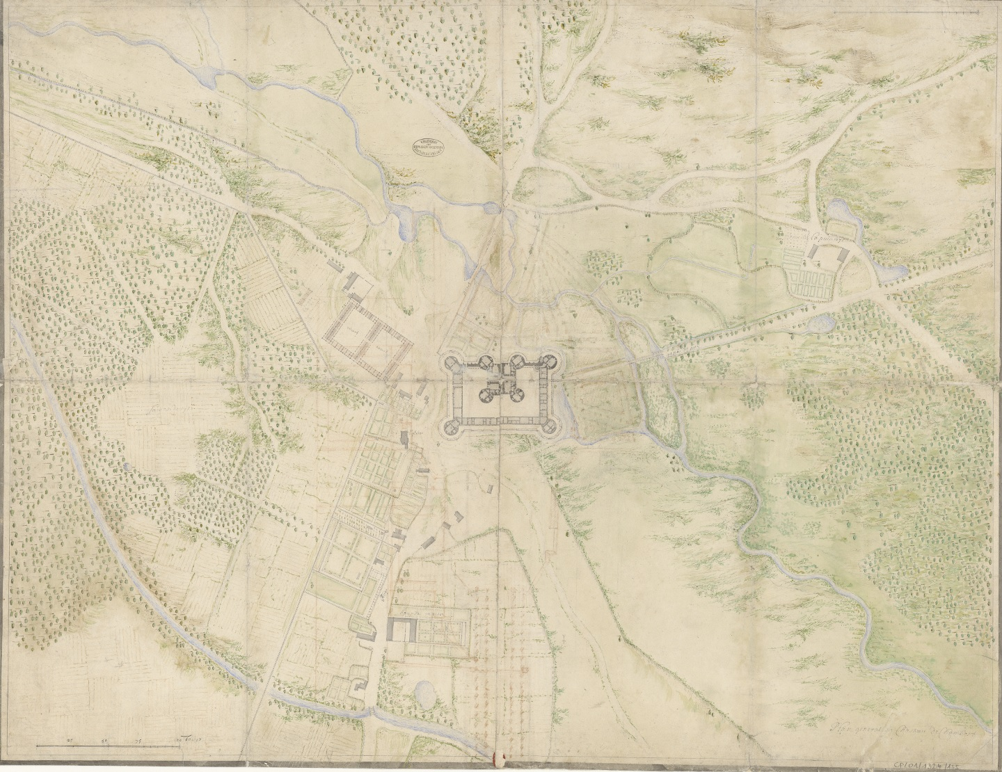 François d’Orbay, Plan du rez-de-chaussée du château de Chambord et de ses abords, relevé mis au net peut-être pour publication, s.d. [1682]